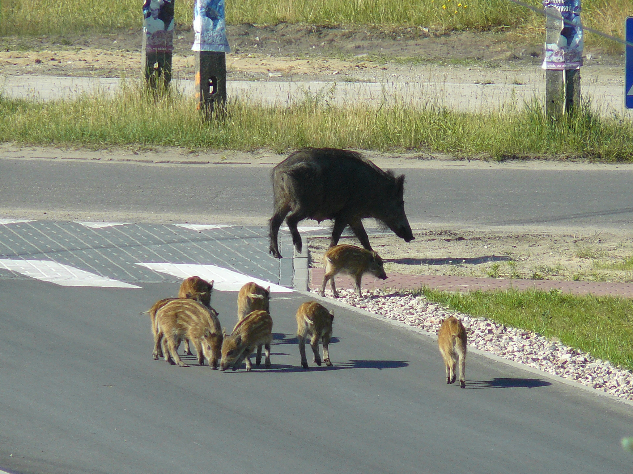 Locha z małymi